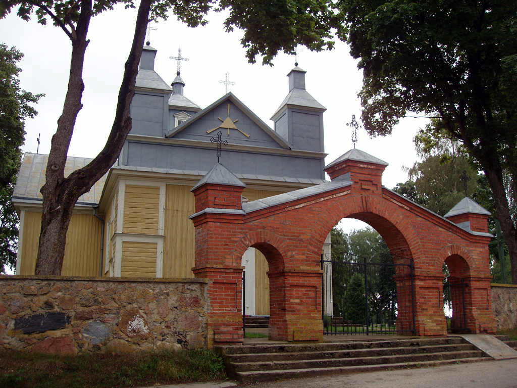 Wooden church in Suginčiai